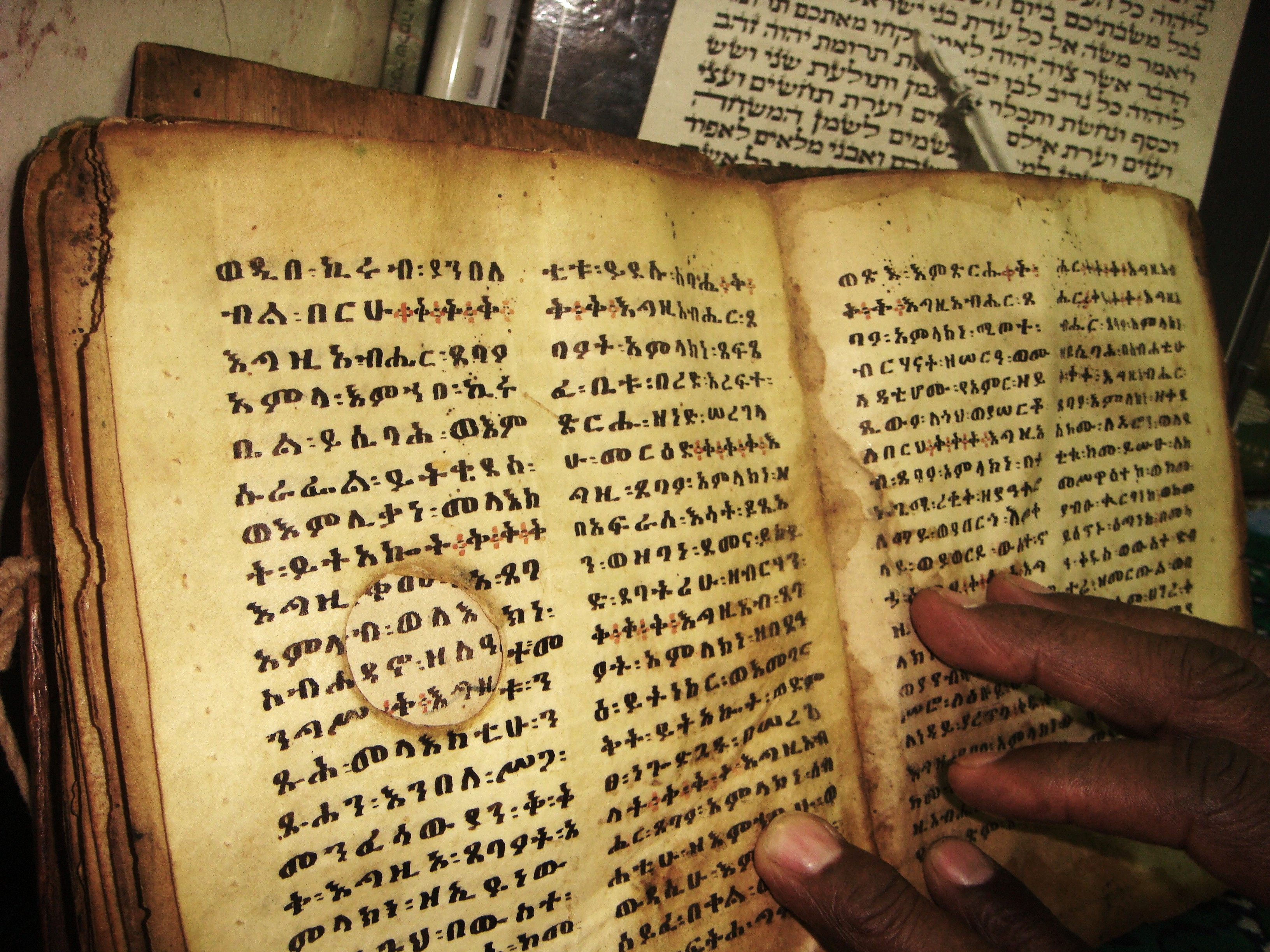 Beta Israel Ge'ez written Ancient Holly book